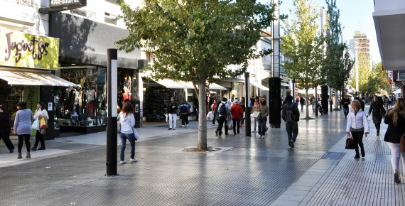 Peatonal de San Martín, Buenos Aires, Argentina.